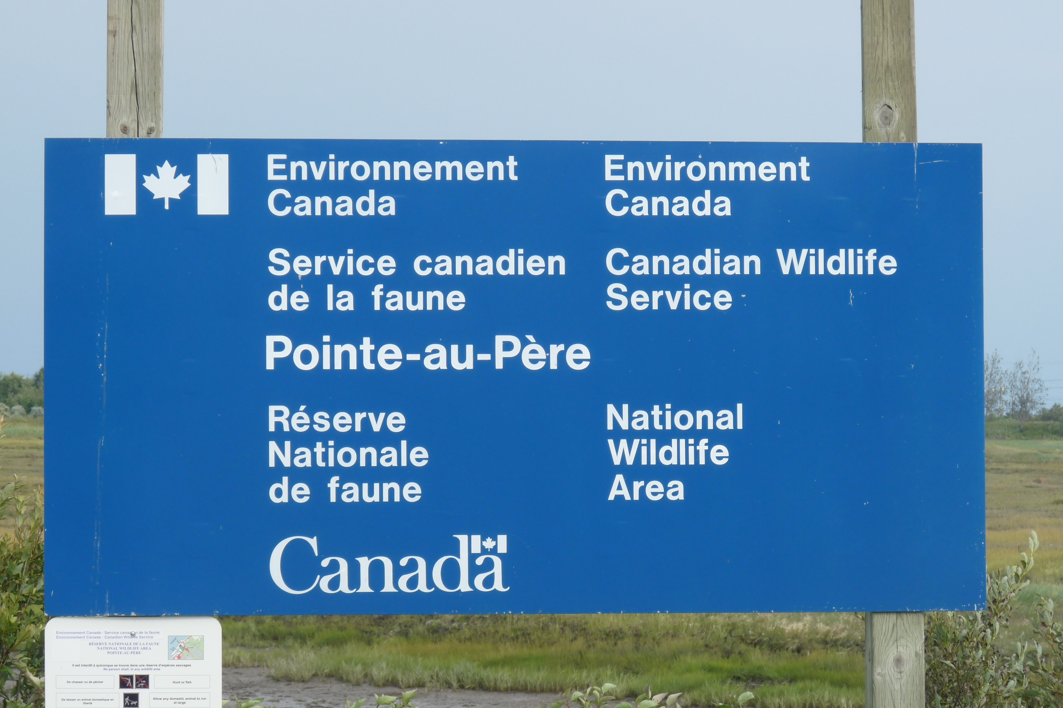 Panneau d'environnement Canada indiquant le site de la réserve de la faune de Pointe-au-Pere